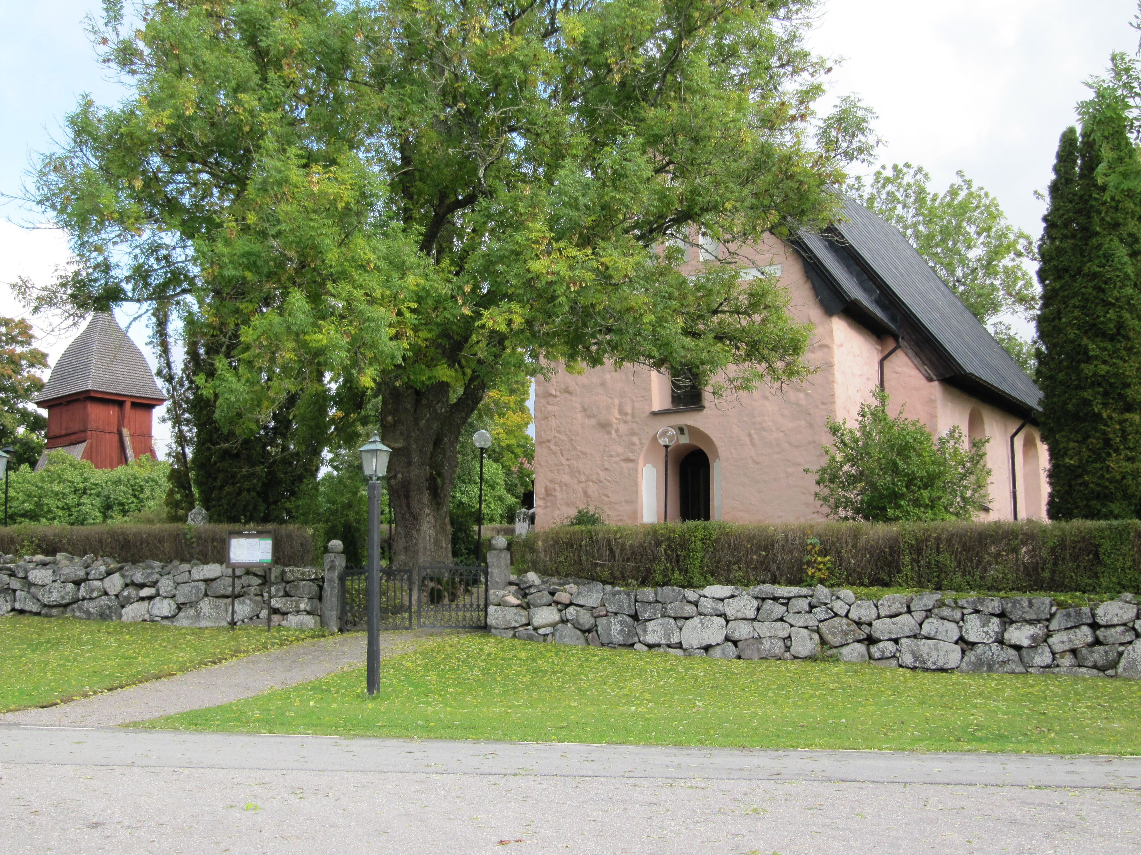 Haga kyrka med klockstapel